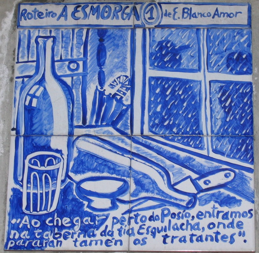 Primeira estación da ruta d'A esmorga (Ourense).